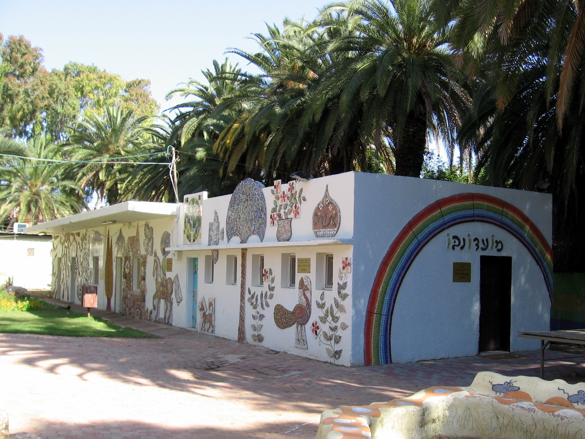 כפר ילדים ונוער אהבה בקרית ביאליק